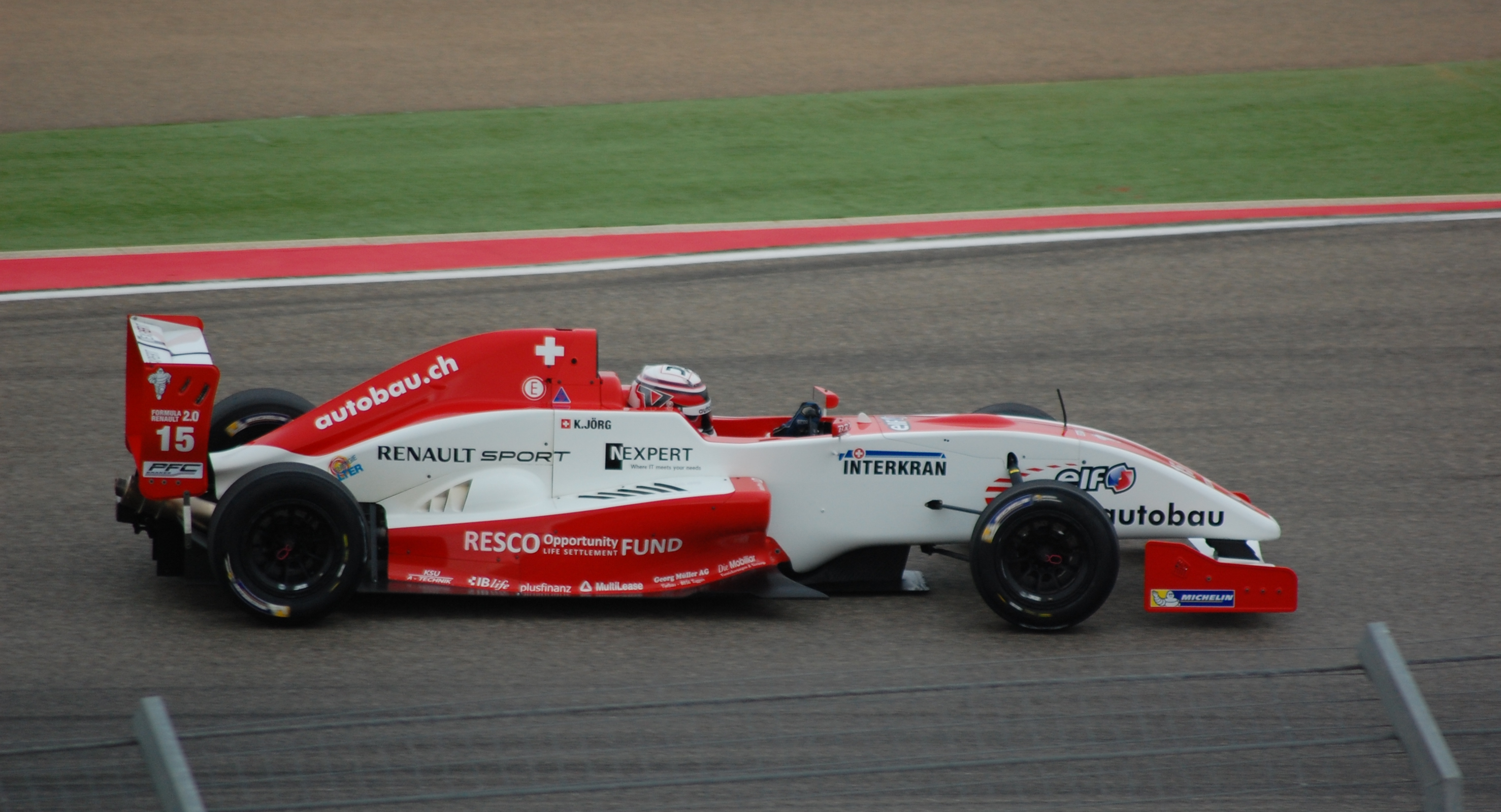 Aragonés: Kevin Jörg Motorland 2014